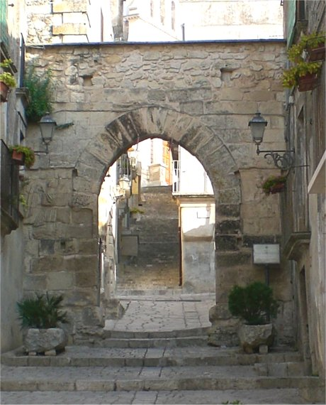 Arco dell'Annunziata a Chiaramonte Gulfi, in Sicilia.